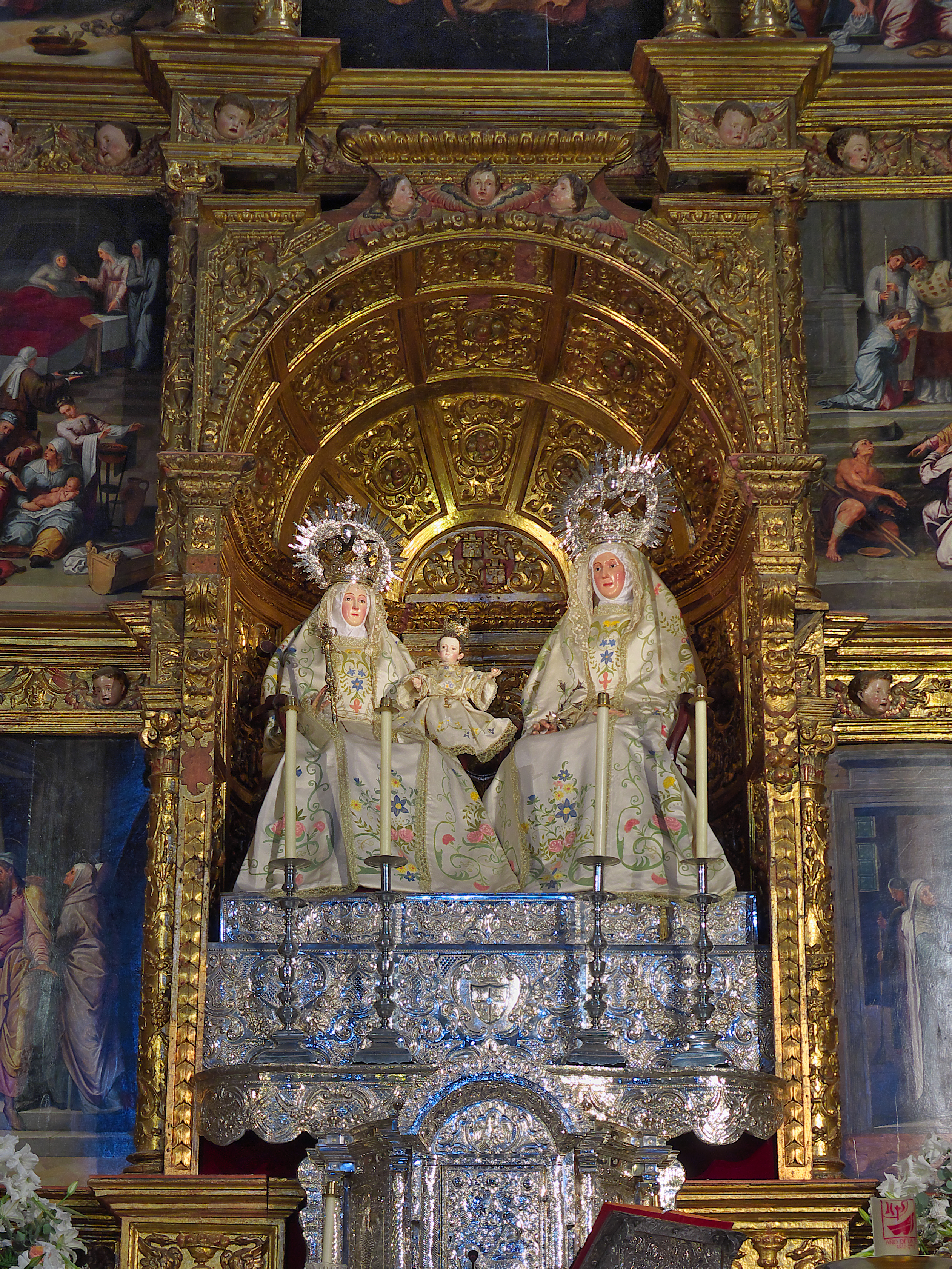 Retablo Mayor. Conjunto escultórico de mediados del XIII, presidiendo el magnífico retablo mayor de la iglesia. Alfonso X era muy devoto de Santa Ana.